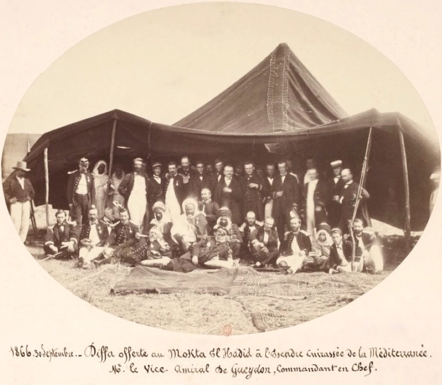 Diffa offerte le 30 septembre 1866, par la société minière Mokta el-Hadid (Algérie), au vice-amiral de Gueydon, commandant en chef.